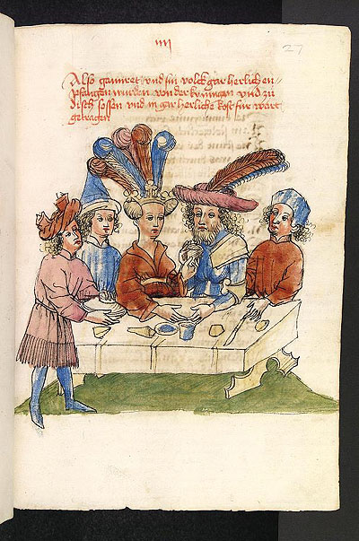 Bildtitel: Belakane bewirtet Gahmuret und dessen Gefolge Transkription Bildüberschrift: Also gamiret vnd sin volck gar herlich enpfangen wurden von der kvnigin vnd zu disch sossen vnd in gar herliche kost fur wart getragen Wolfram von Eschenbach, Parzival (Handschrift), Hagenau, Werkstatt Diebold Lauber, um 1443-1446, Cod. Pal. germ. 339, I. Buch, Blatt 27r.